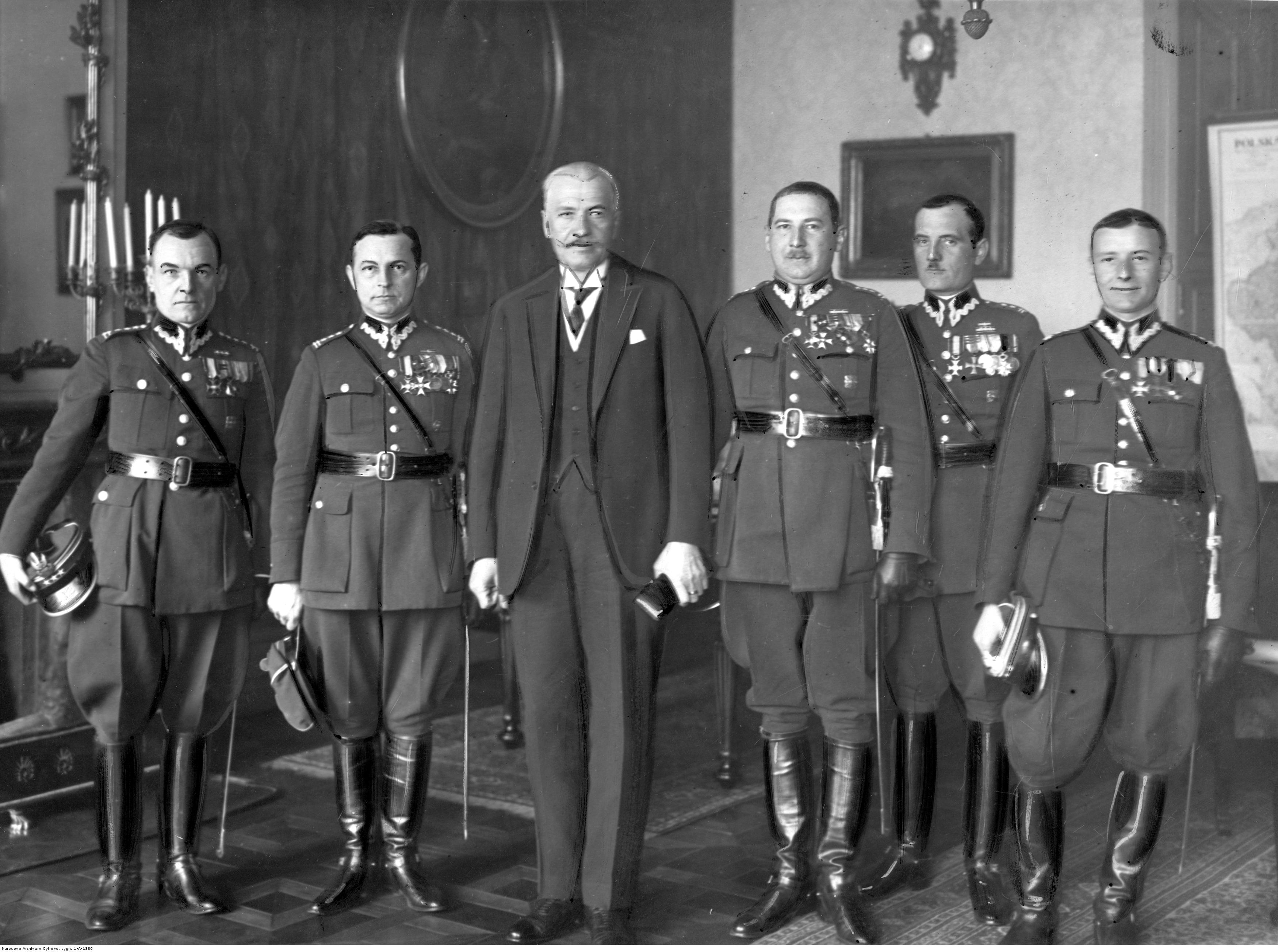 Delegacja dowódców pułków 1 Dywizji Piechoty Legionów na audiencji u prezydenta RP Ignacego Mościckiego na Zamku Królewskim w Warszawie; luty 1930. Prezydent RP Ignacy Mościcki (3. z lewej) w otoczeniu członków delegacji; od lewej: dowódca 6 pp Leg. płk Stefan Leon Biestek, dowódca 1 DP Leg. płk Jak Kruszewski, dowódca 5 pp Leg. Teodor Furgalski, dowódca 1 pp Leg. ppłk Zygmunt Wenda, ppłk Władysław Filipkowski. Koncern Ilustrowany Kurier Codzienny - Archiwum Ilustracji. Sygnatura: 1-A-1380